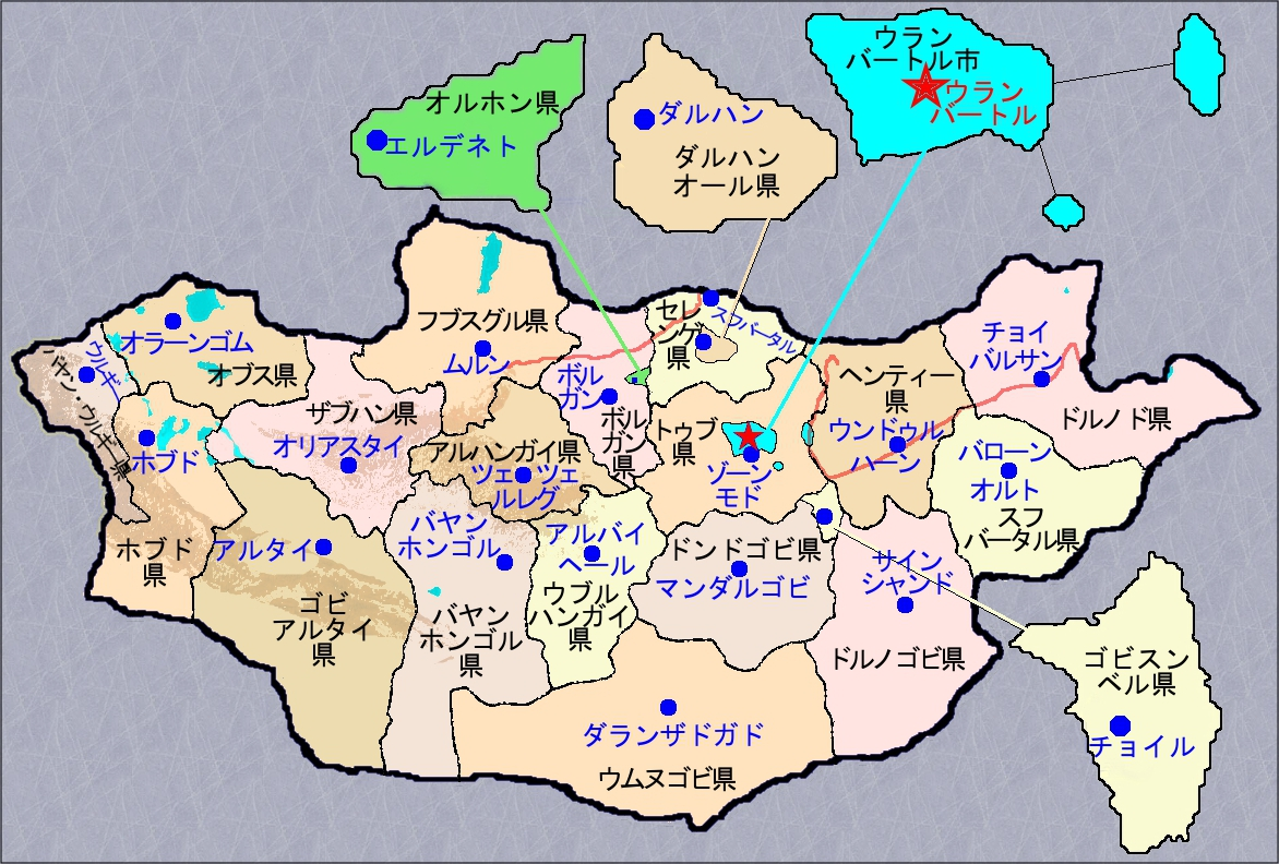 モンゴルの地方行政区分地図です。 この地図には、関連地図が存在します。 次のURLサイトでお確かめください。[1]